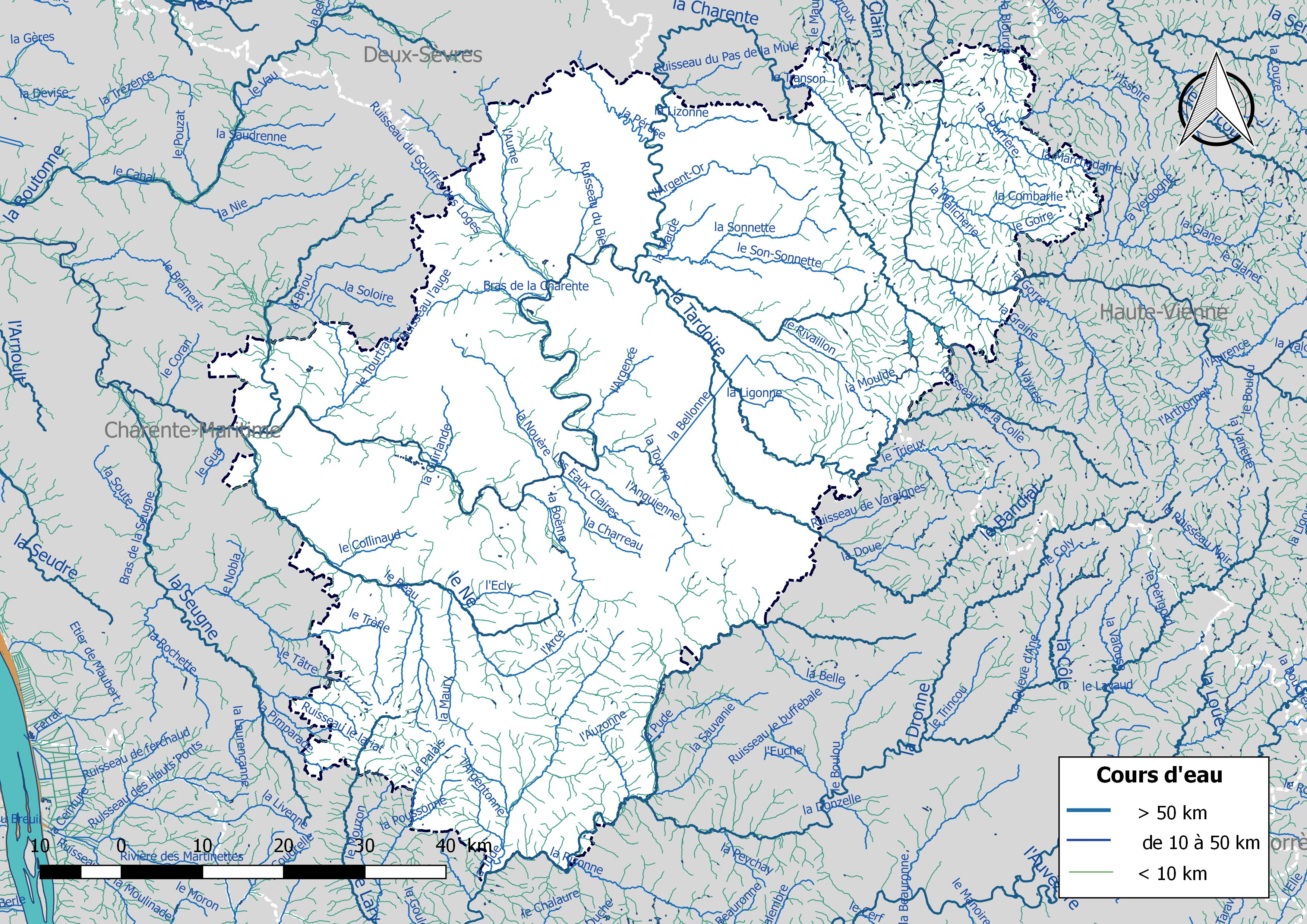 Réseau hydrographique du département de la Charente (France).